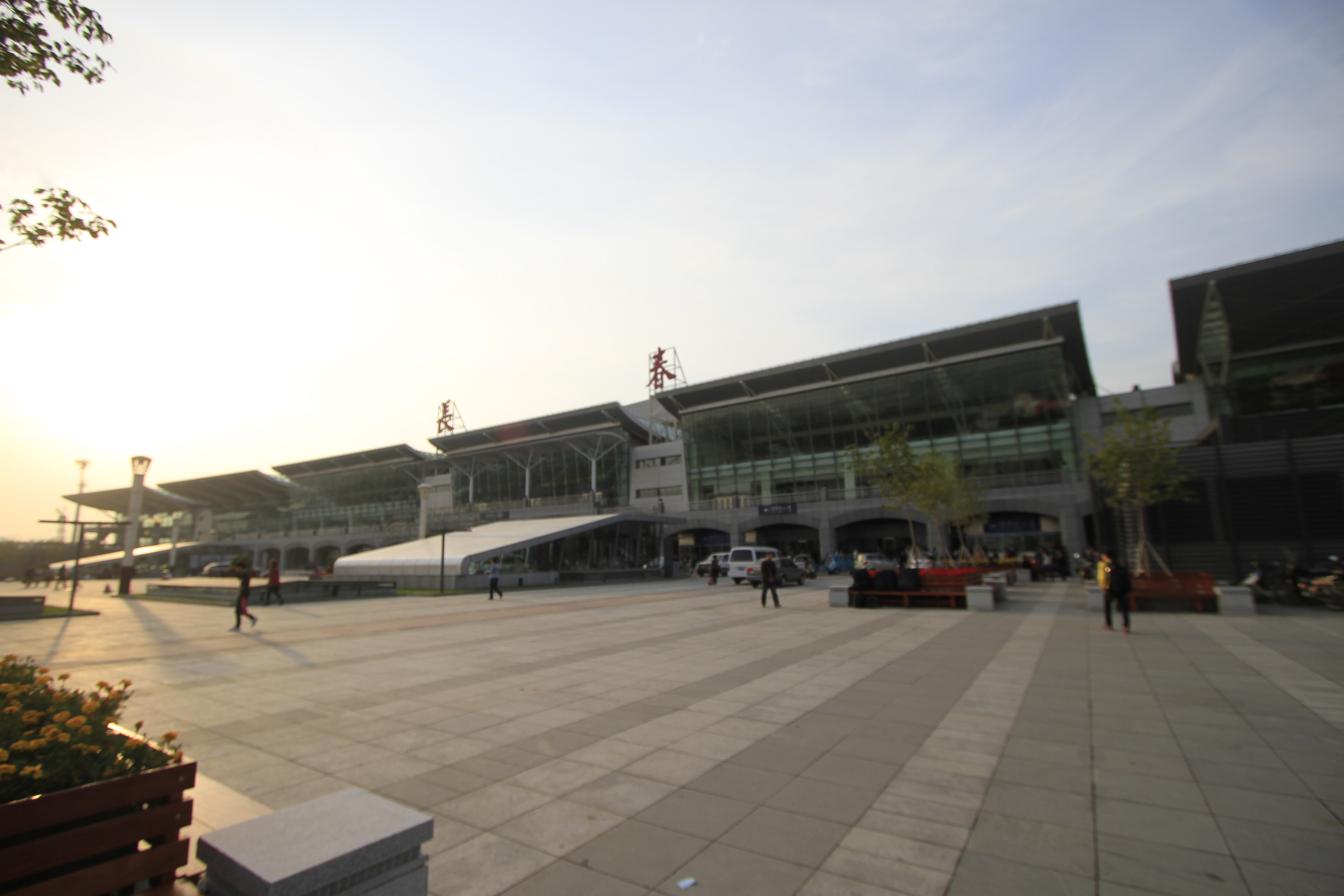 长春站北站房